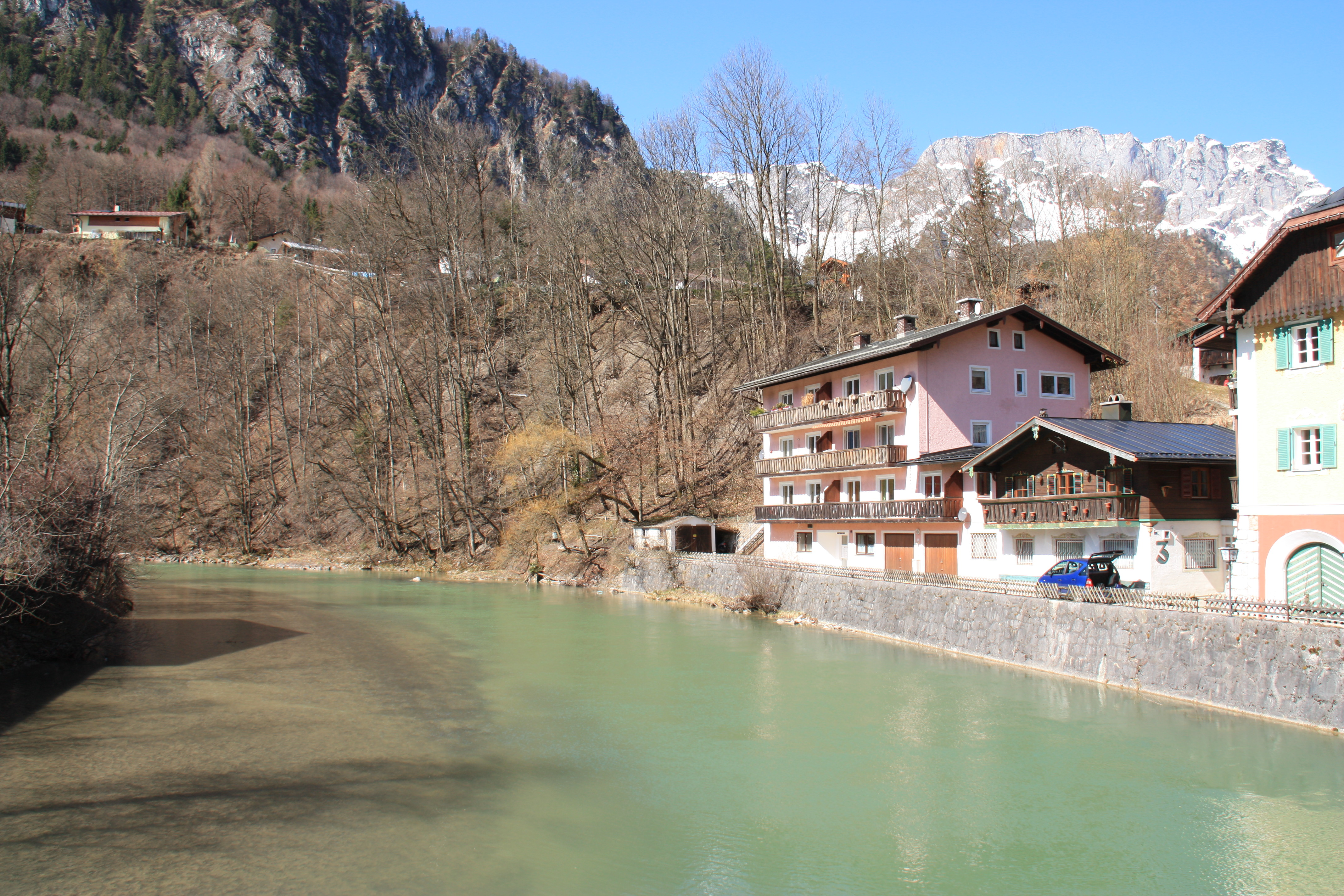 Die Berchtesgadener Ache in Marktschellenberg bei Berchtesgaden